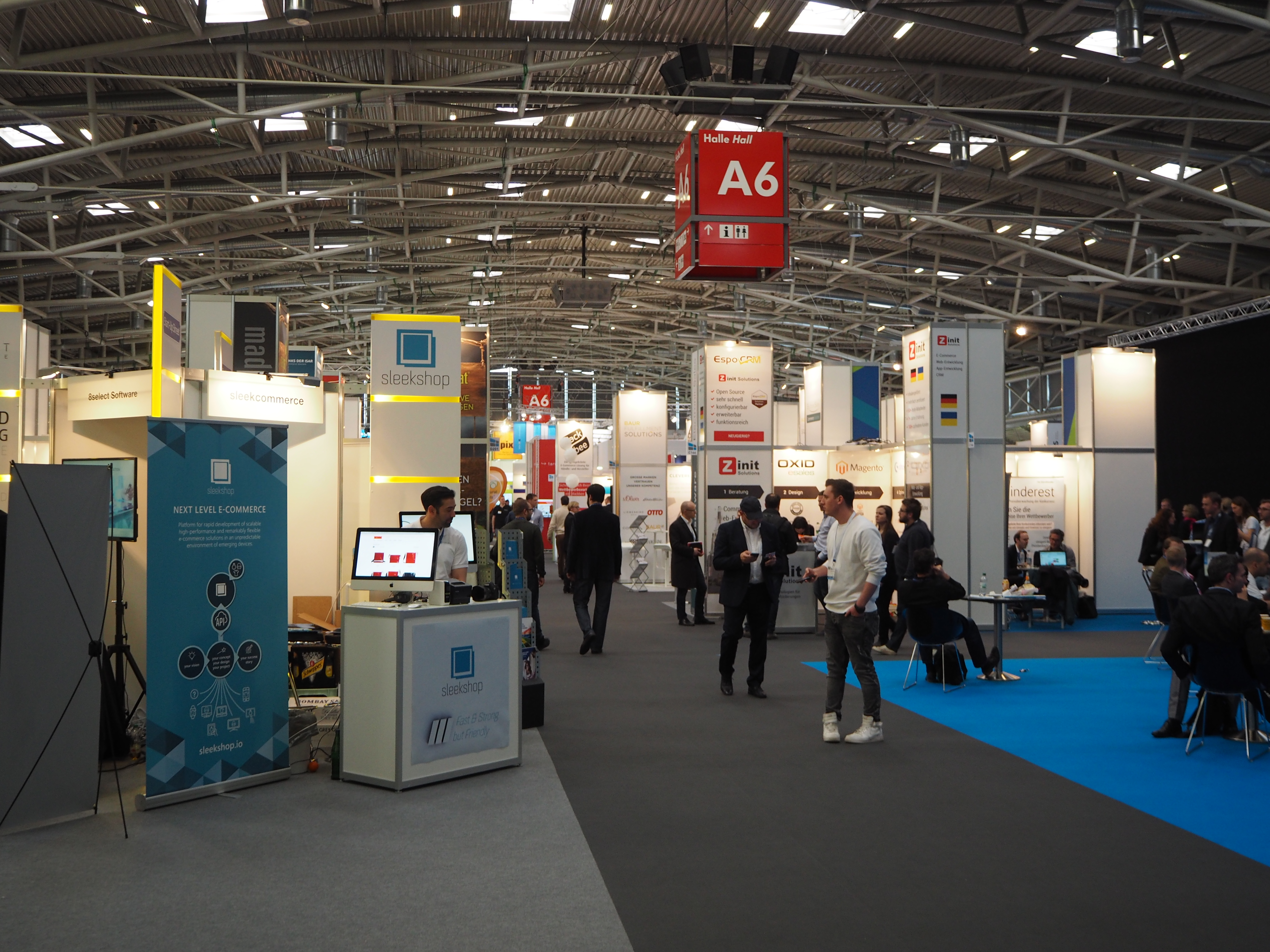 Internet World Fair 2017 in Munich, Germany, Halle A6, Shopsysteme